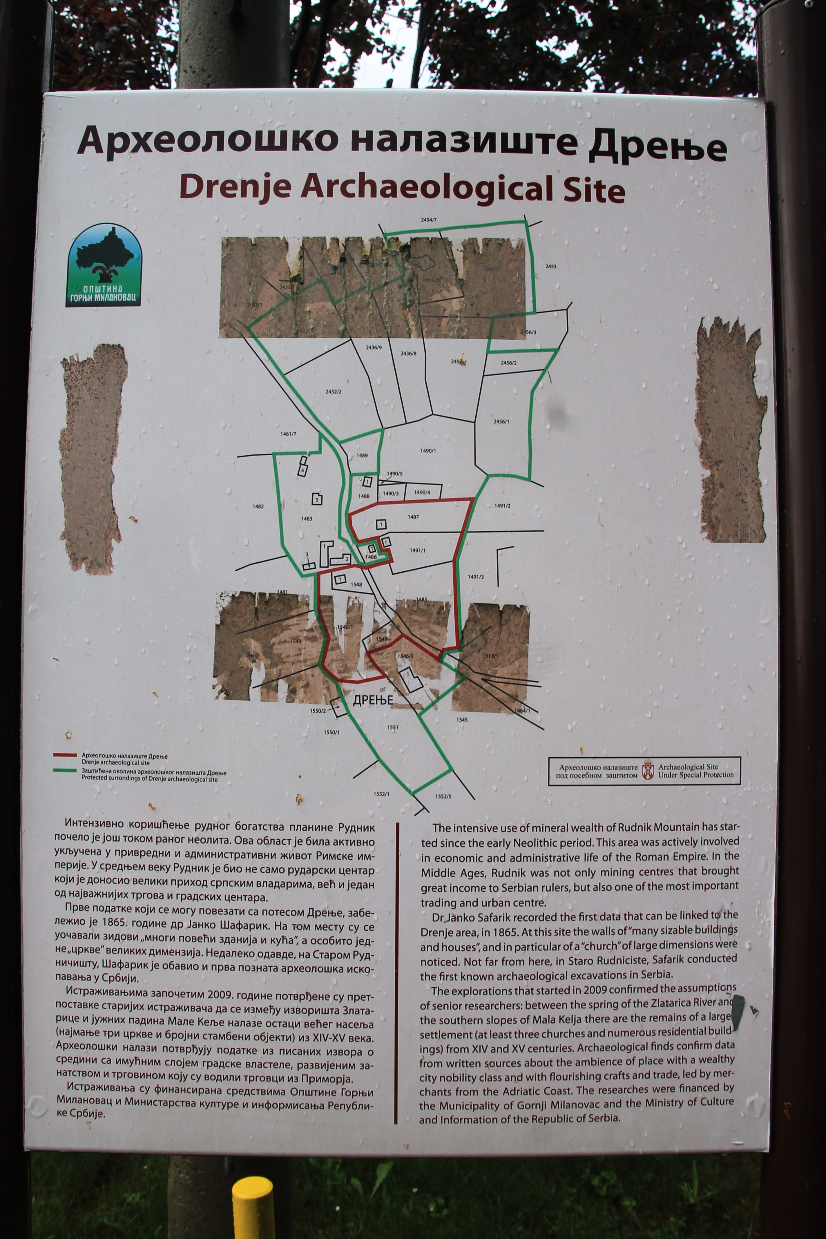 Rudnik (Gornji Milanovac)